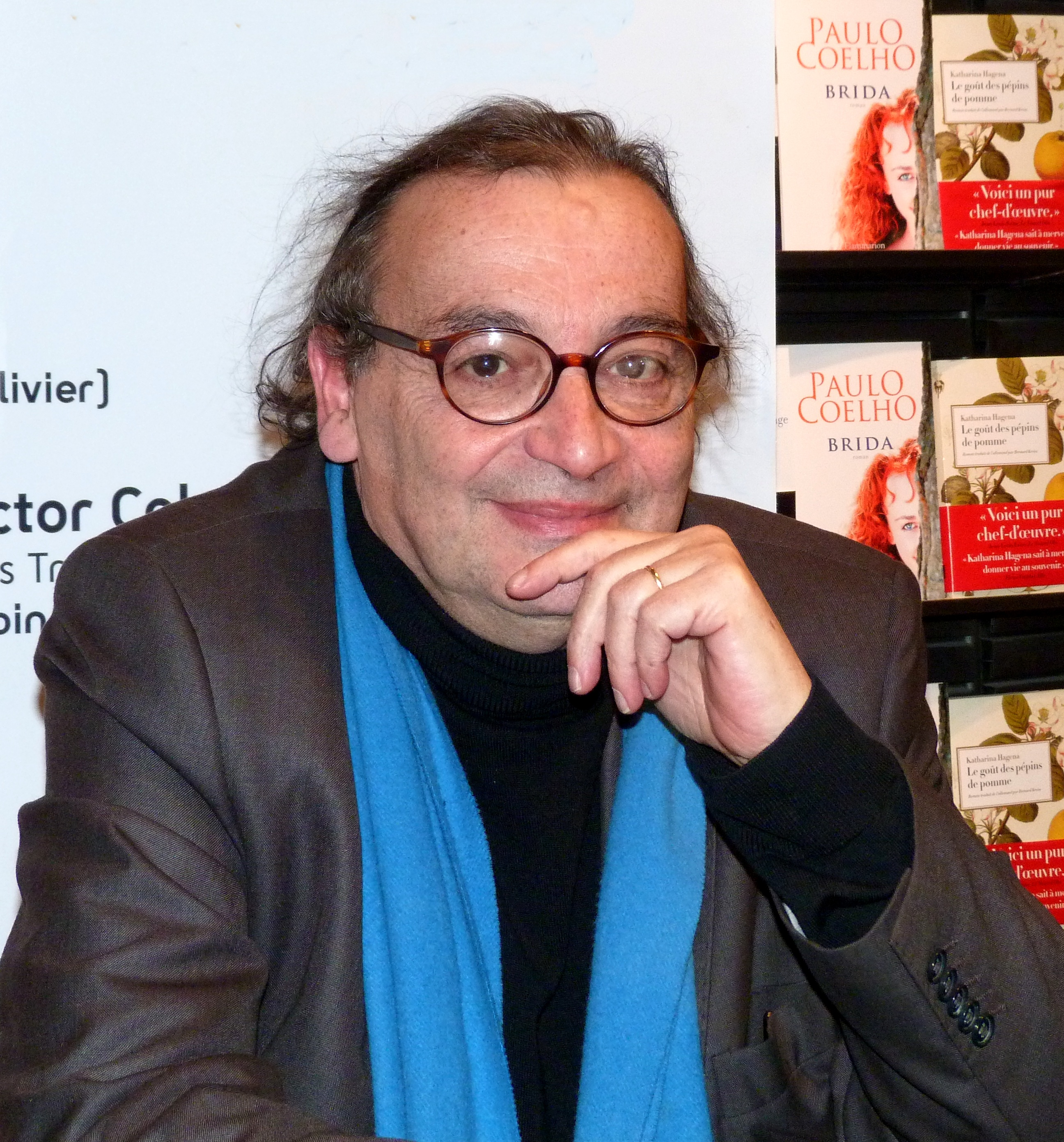 Victor Cohen Hadria, lors d'une signature à la FNAC Forum à Paris, pour son livre "Les Trois Saisons de la rage", le 26 novembre 2010.